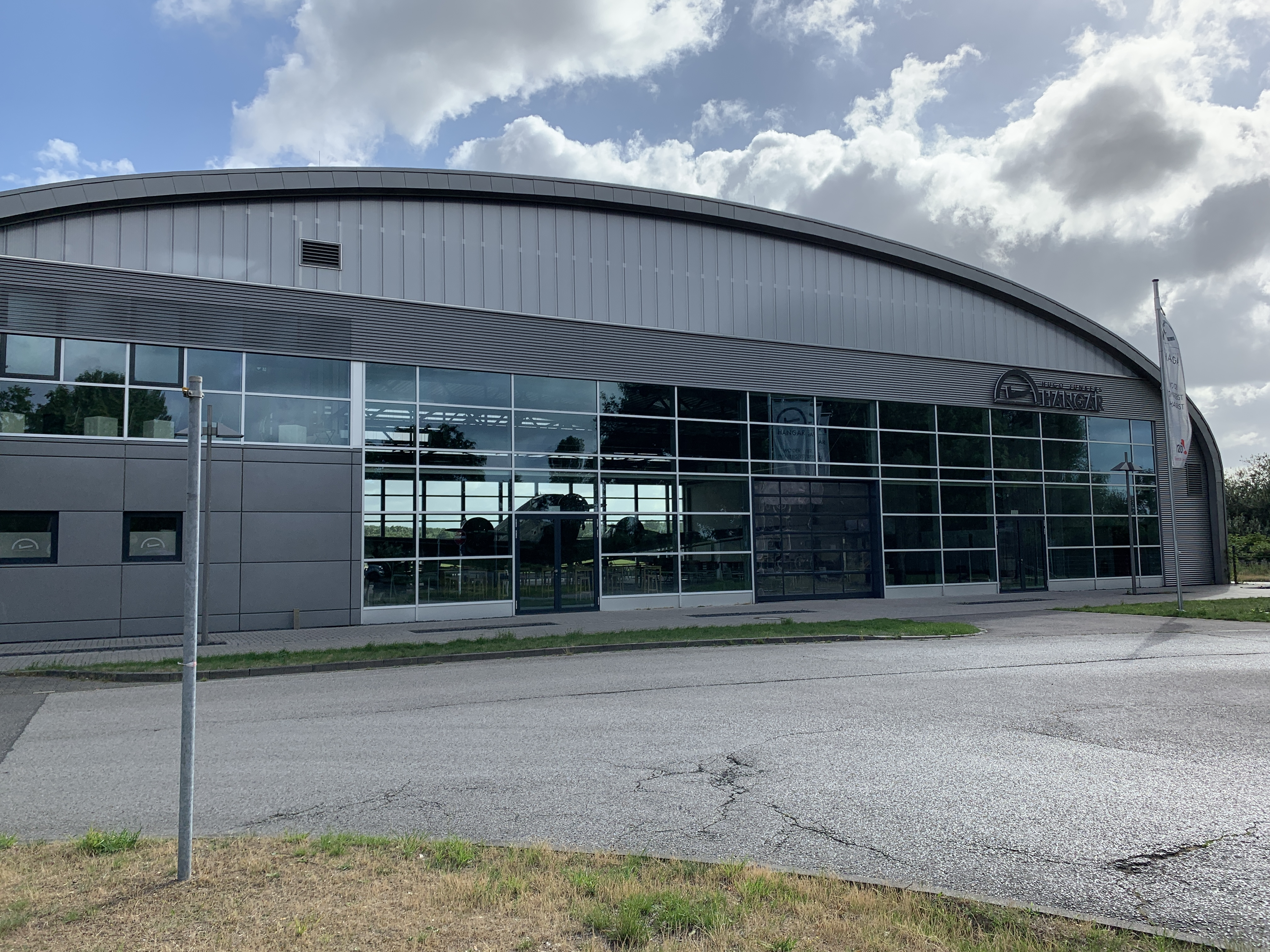 Hugo Junkers Hangar Flughafen Mönchengladbach